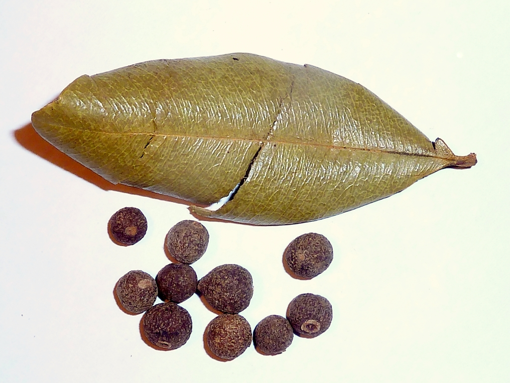 Pimienta racemosa (Malaguetta, bay-rum) . Hoja y granos secos listos para condimentar - Route de Clairière, Fort-de-France (Martinica, Caribe francés).